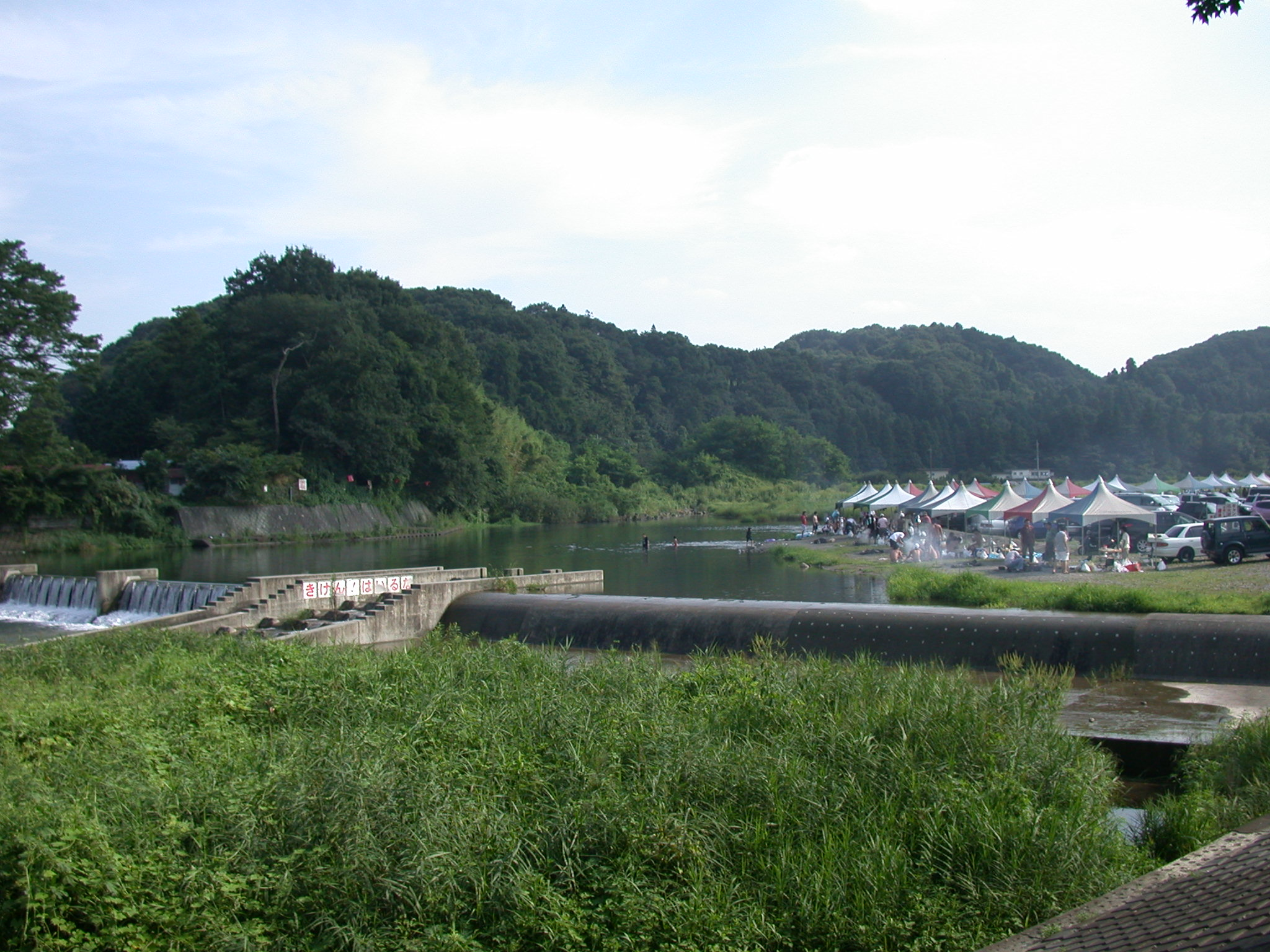 Takatsuki Castle